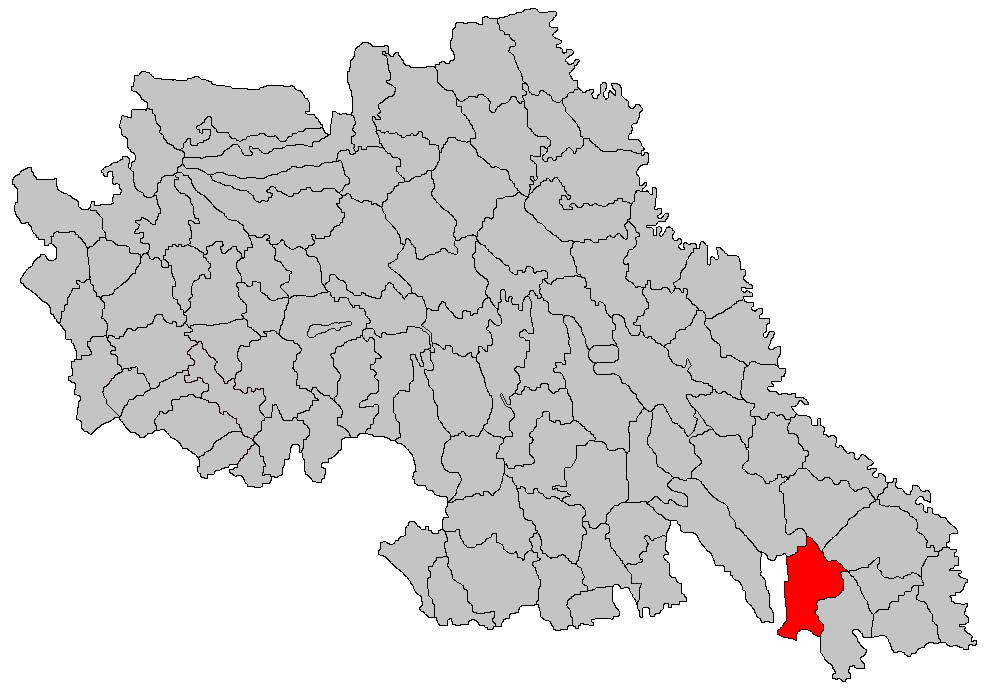 Categorie:Hărţi ale judeţului Iaşi